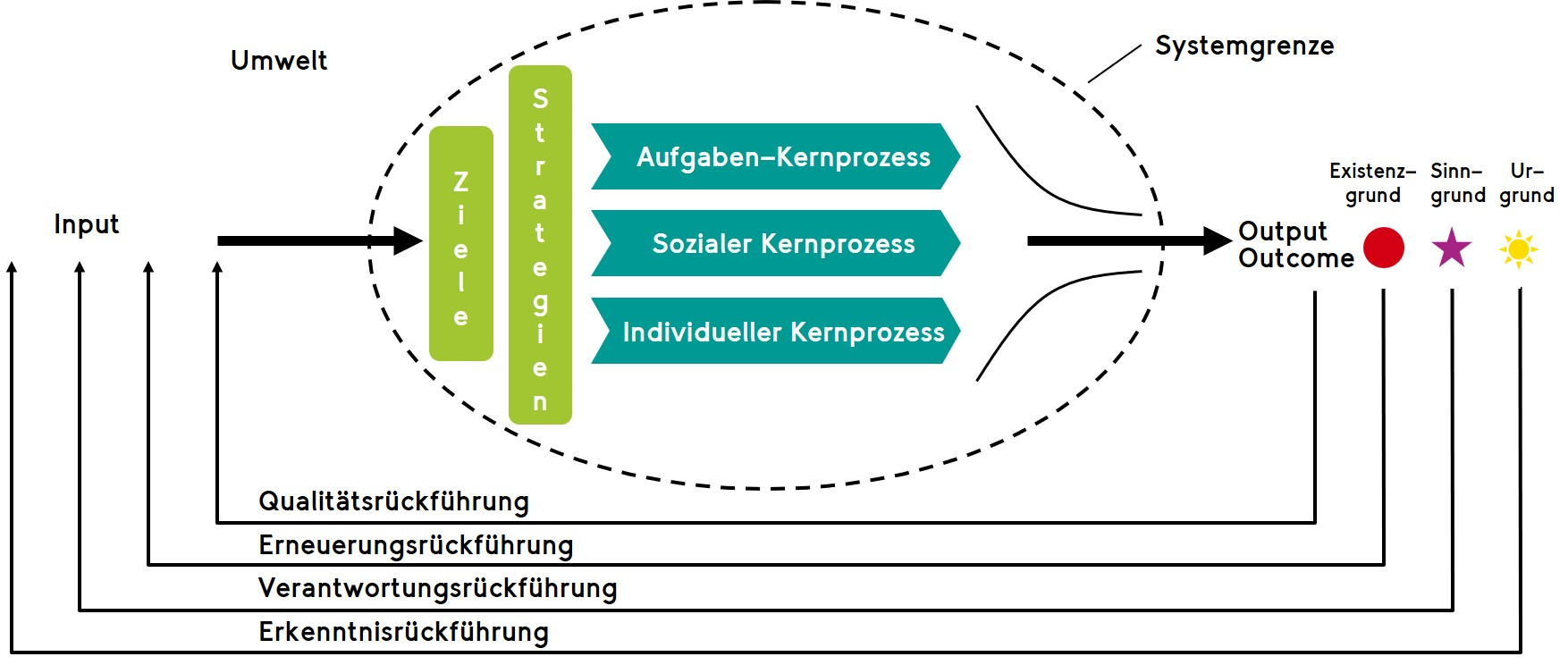 OSTO-Systemmodell Prozessvariante